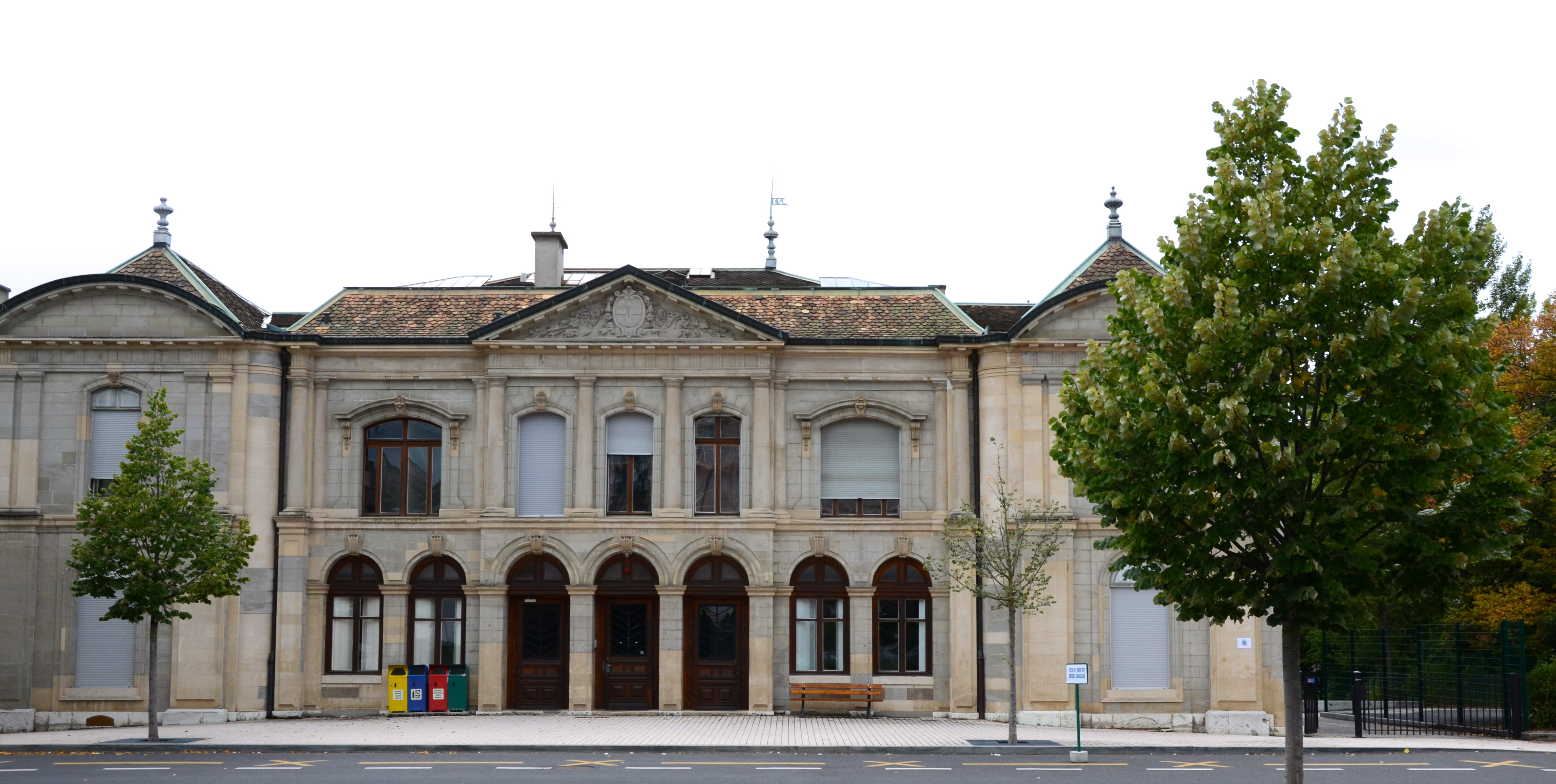 Domaine de la Grande-Boissière, Route de Chêne 60. Genève